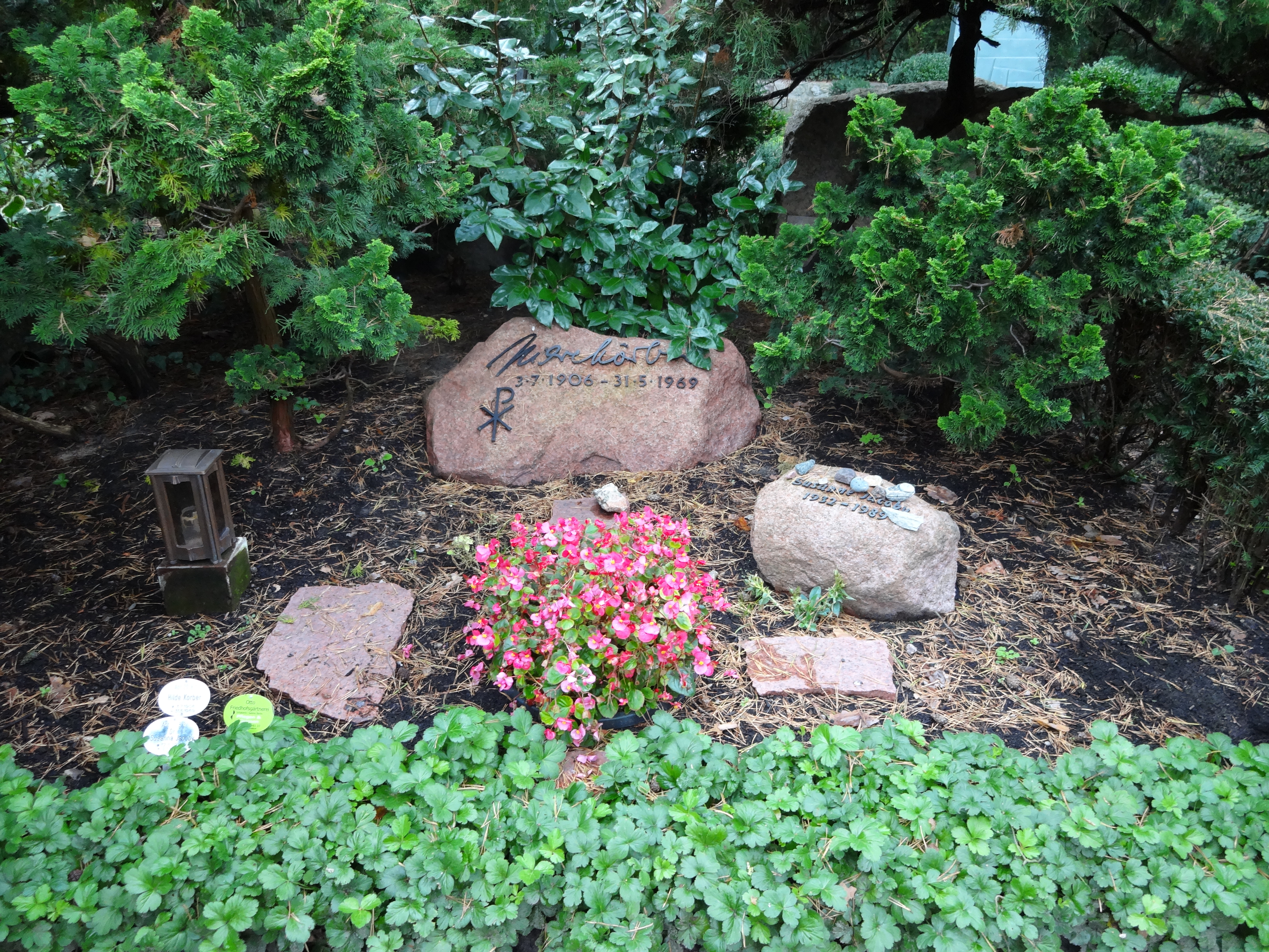 Grab der Schauspielerin Hilde Körber auf dem Waldfriedhof Dahlem in Berlin, ehemaliges Ehrengrab